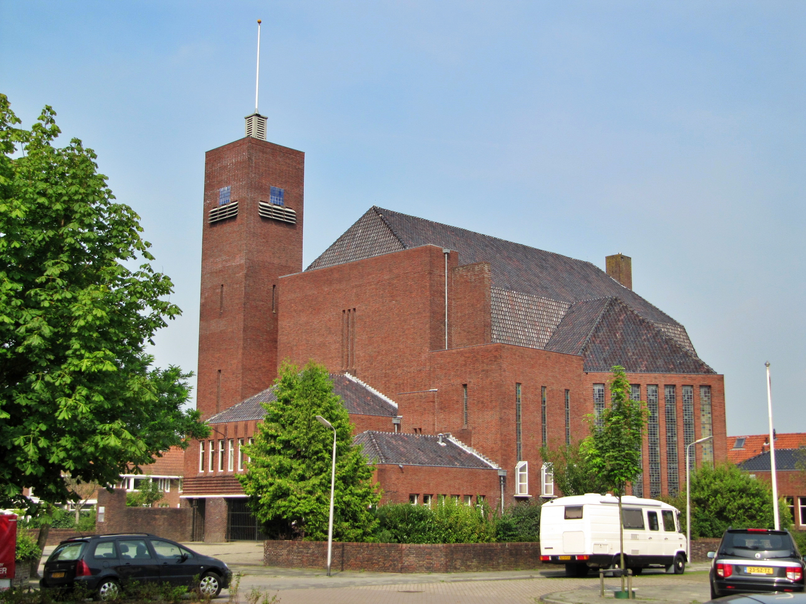 RM519894 Leeuwarden - Pelikaanstraat 10 (foto 3).jpg